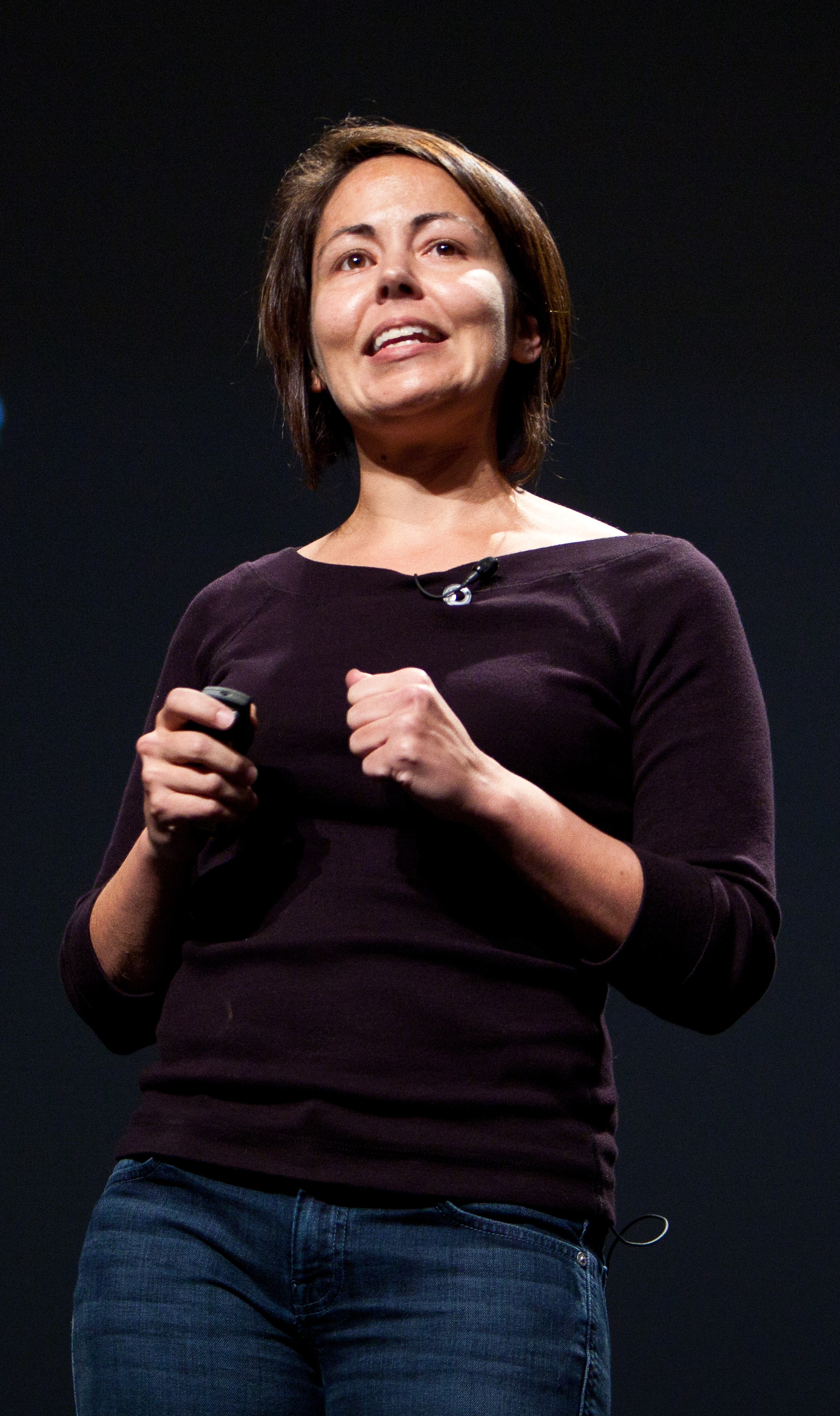 Beth Shapiro - PopTech 2010 - Camden, Maine Photo: Kris Krüg